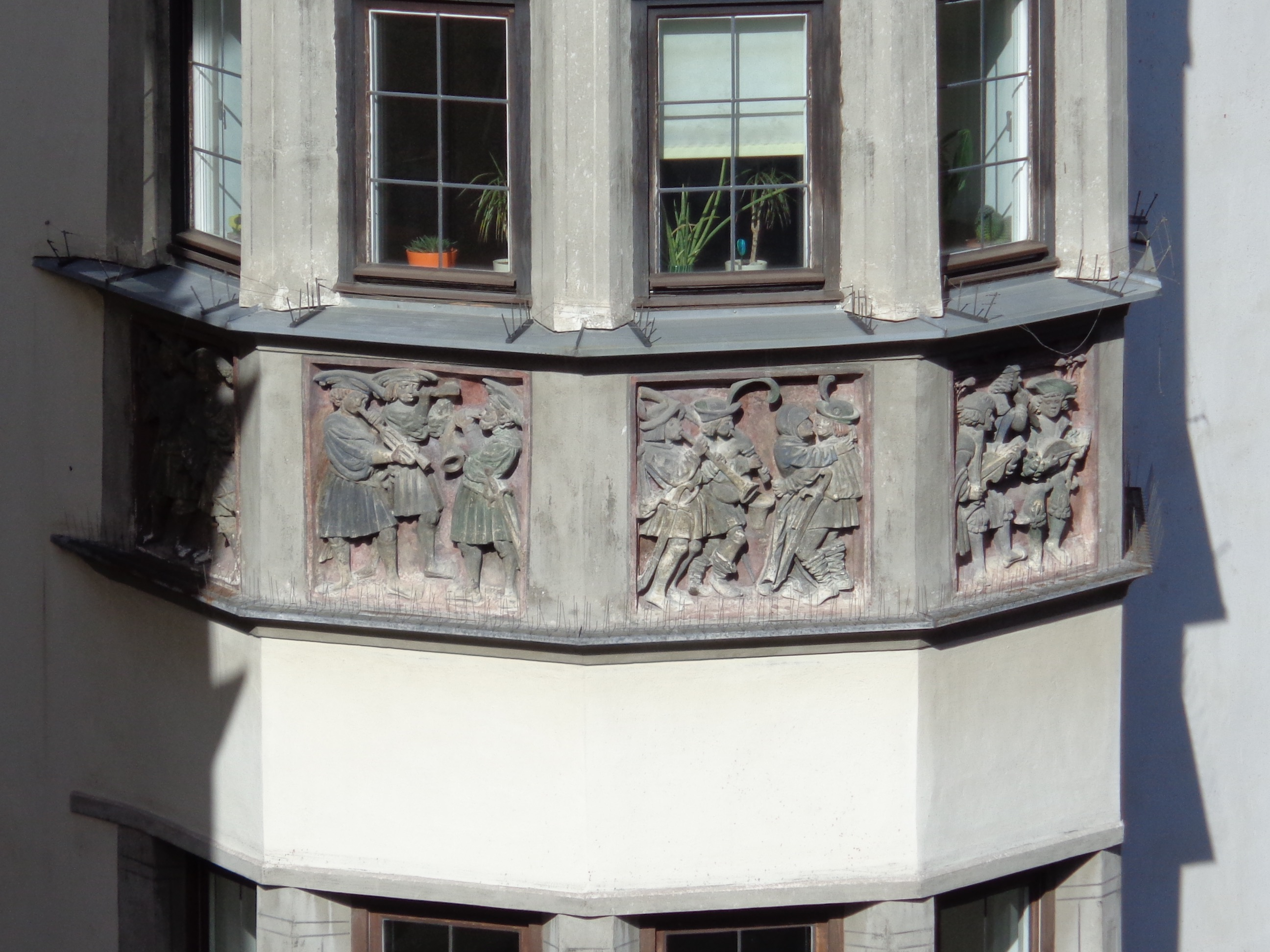 Reliefs mit Spielleuten und Tanzpaar am Katzunghaus